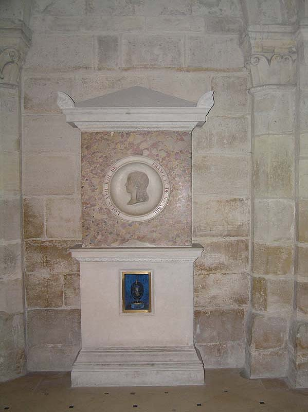 Mausolée du coeur de Louis XVII roi de France